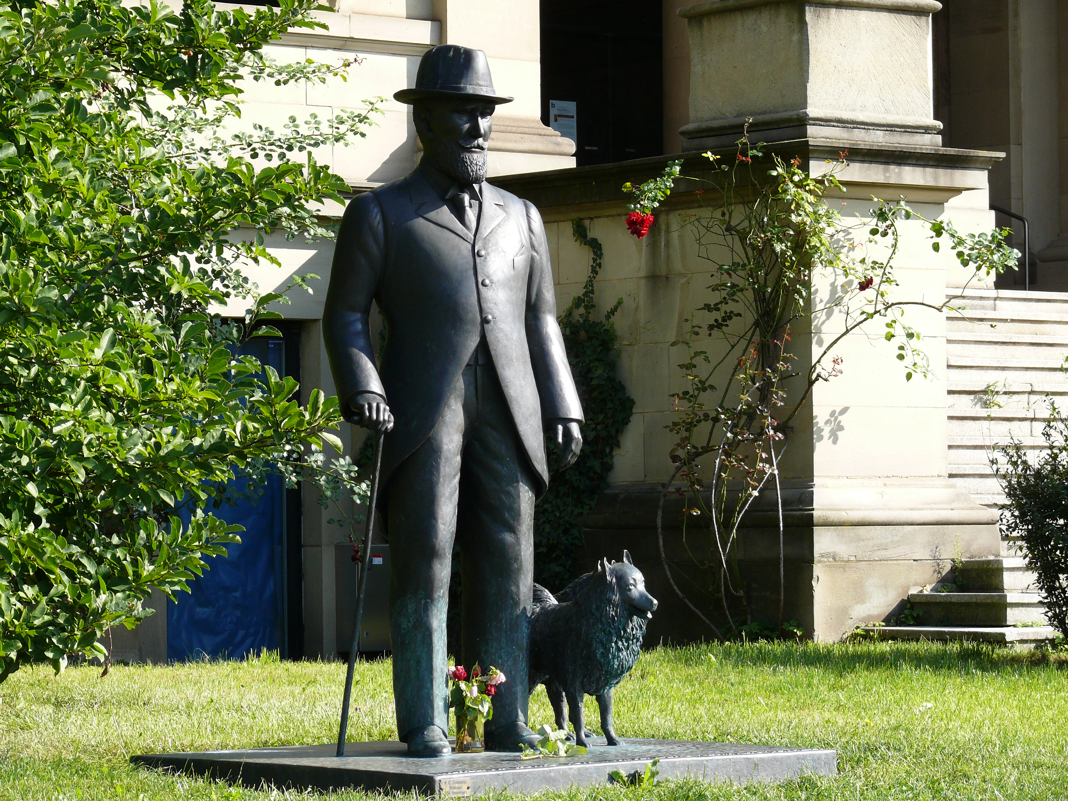 Denkmal zu Ehren von König Wilhelm II, vor dem Stadtmuseum (im Wilhelmspalais) in Stuttgart.